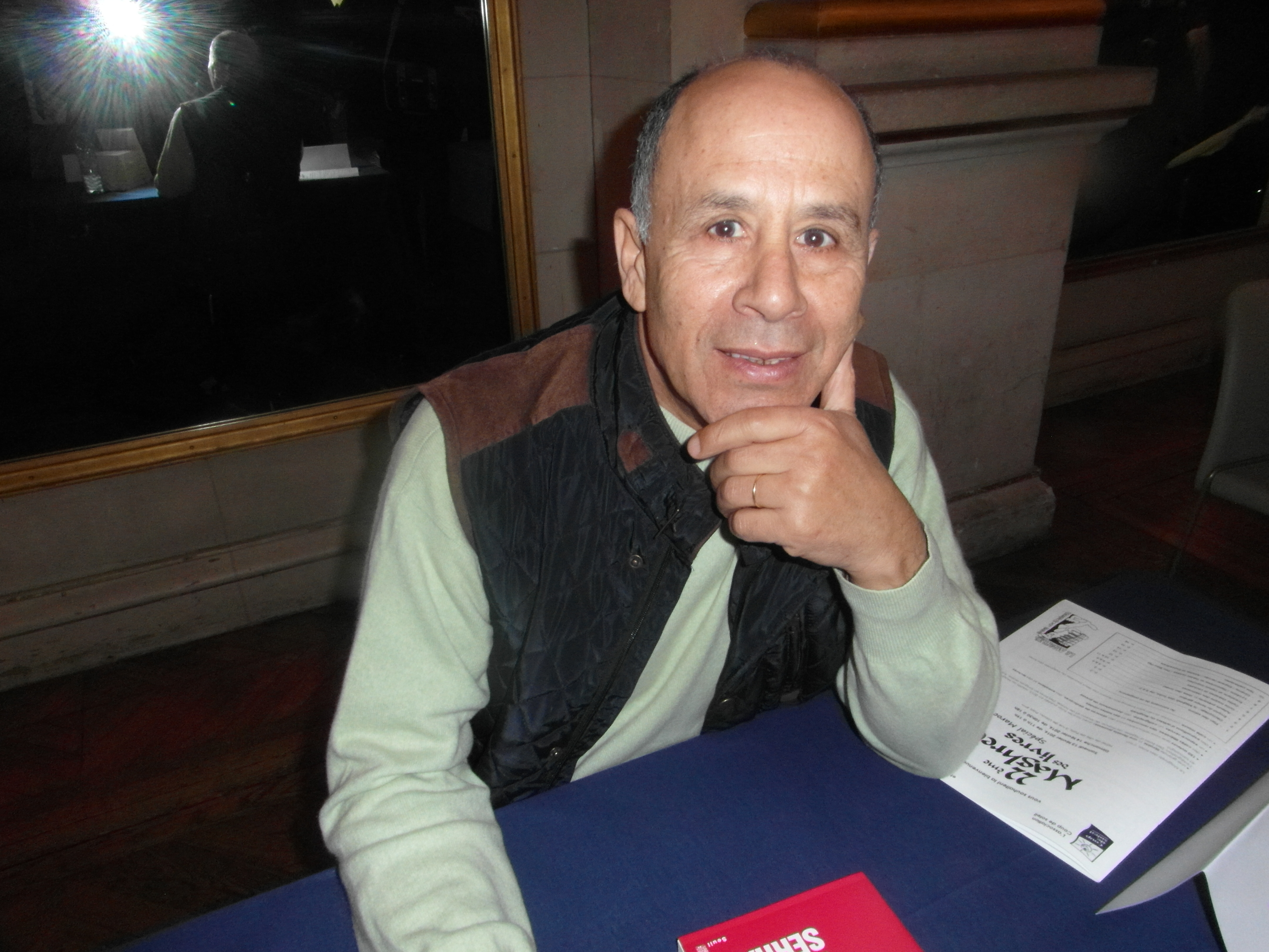 22e Maghreb des Livres, 13 et 14 février 2016